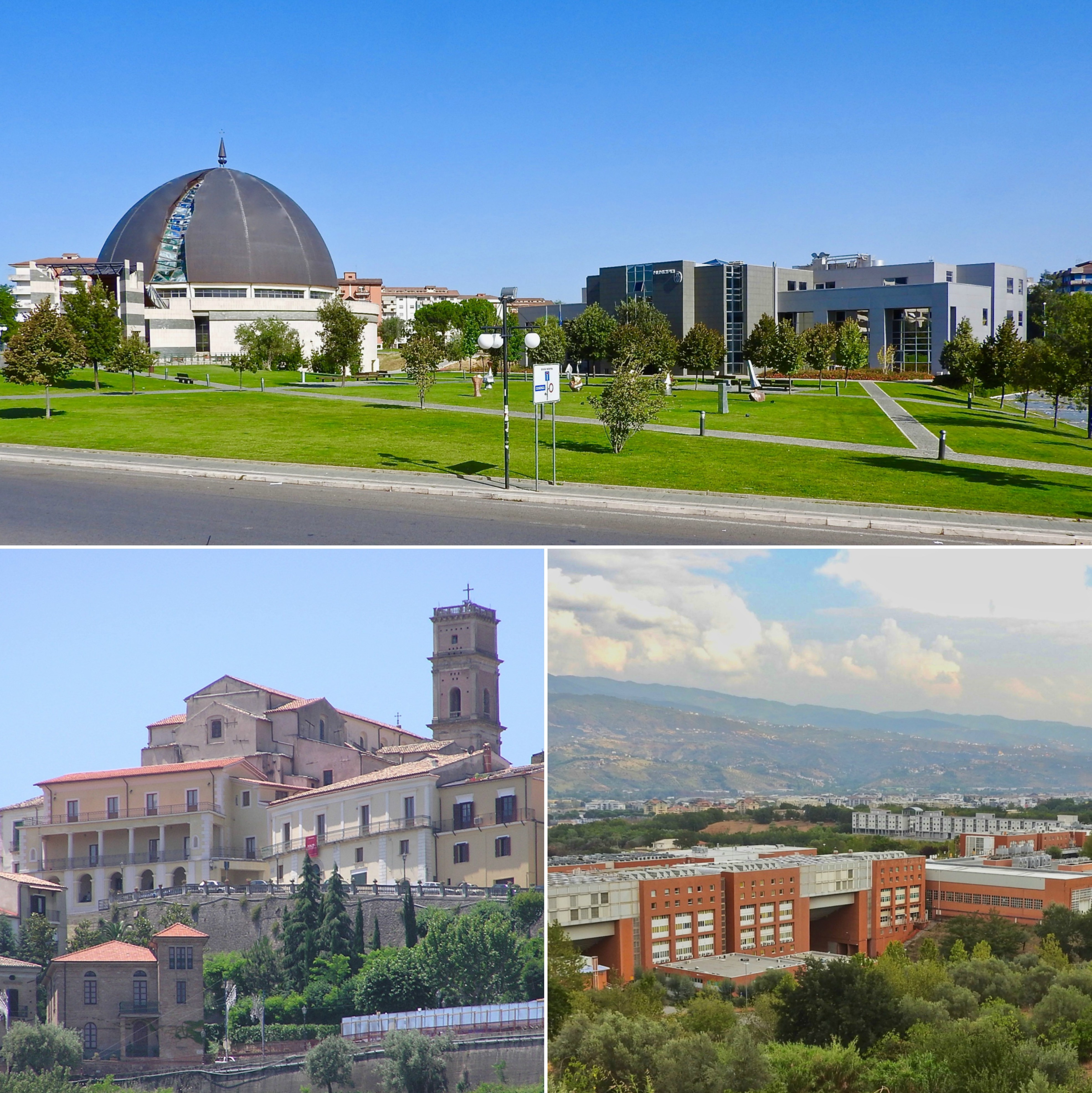 it|1=collage delle foto